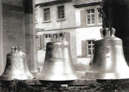 Glockenweihe der Glocken für die römisch-katholische Stadtpfarrkirche in Waibstadt im Dezember 1922